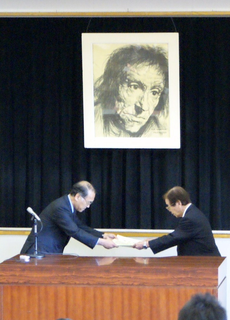 広島大学の受賞式にて 創立者・西谷英雄